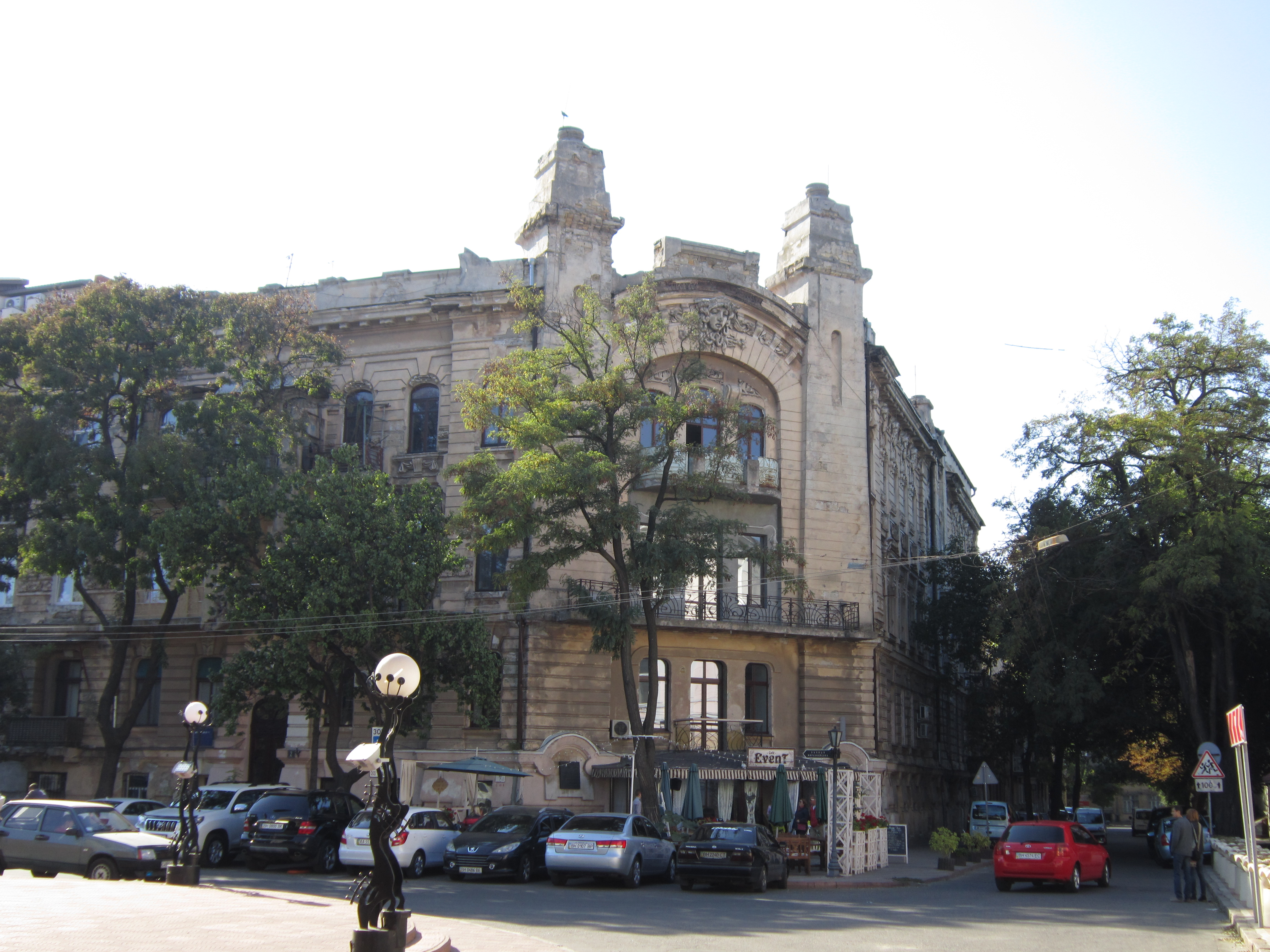 Будинок прибутковий Луцького, в якому жили:- О.І. Купрін - письменник;- В.Н. Пінегін – вчений гідравлік, професор, Одеса, Маразліївська вул., 2 (ріг вул. Маразліївської, 2 та пров. Нахімова (Барятинського)